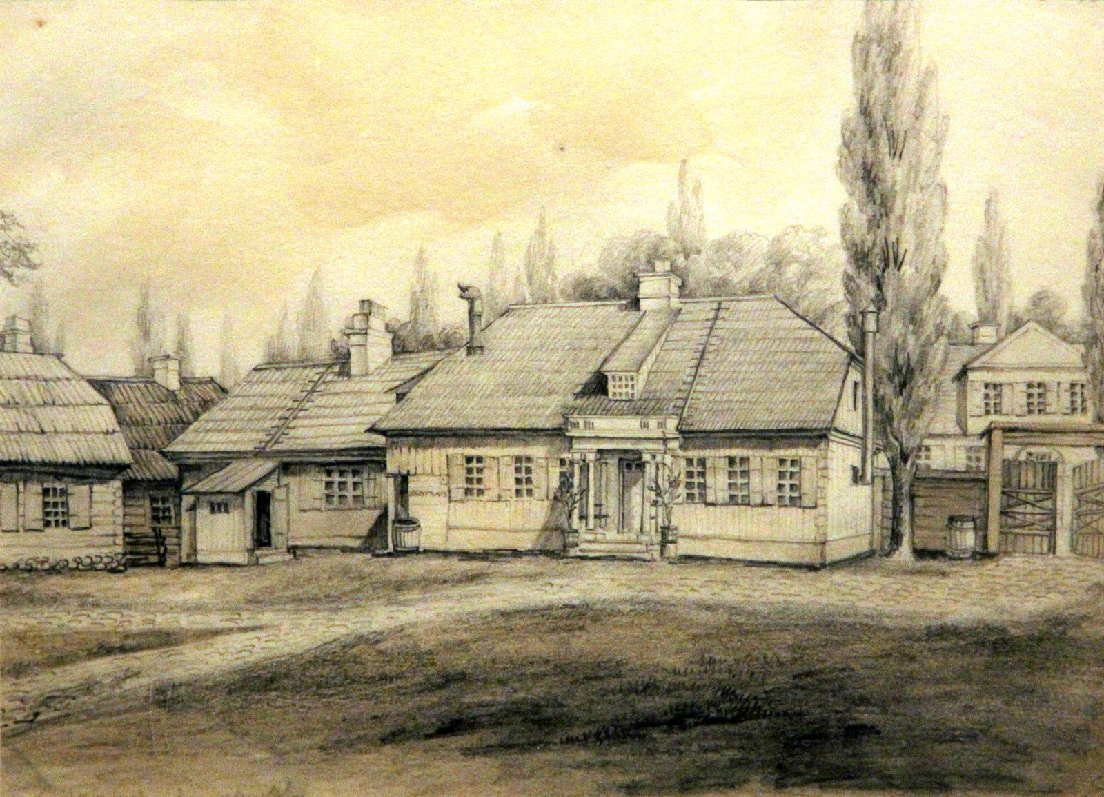 Гродно. Дом Маковельской на улице Скалмоновской. 1887 Рисунок карандашом, подправленный сепией Национальный музей в Кракове